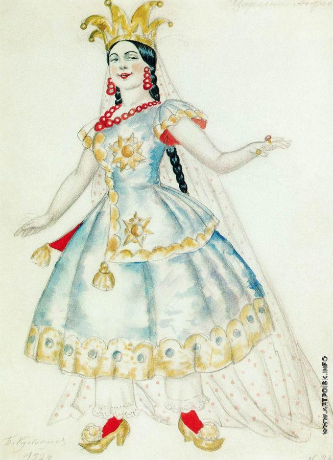 Кустодиев Борис Михайлович [1878—1927] Царевна Анфиса. 1924 Эскиз костюма к спектаклю Замятина «Блоха»